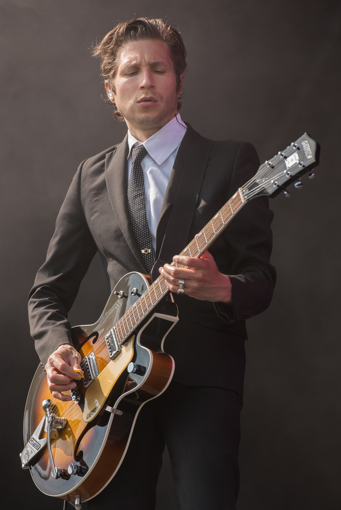 ARGO-Konzerte,Daniel Kessler,Festival,Interpol,Konzert,Livekonzert,Livemusik,Musik,RiP,Rock im Park 2015,Seat Zeppelin Stage